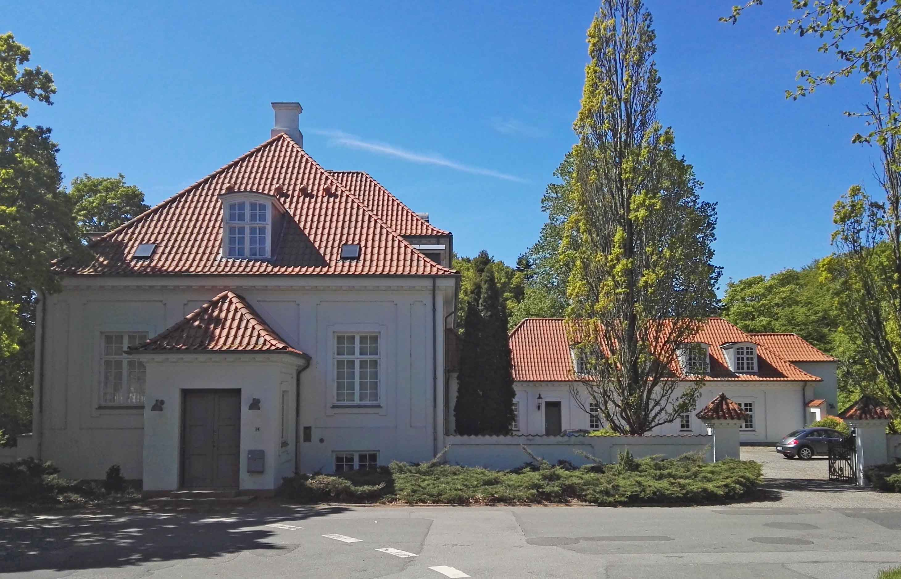 Villaen Møgelbjerg i Hammer Bakker ved Vodskov